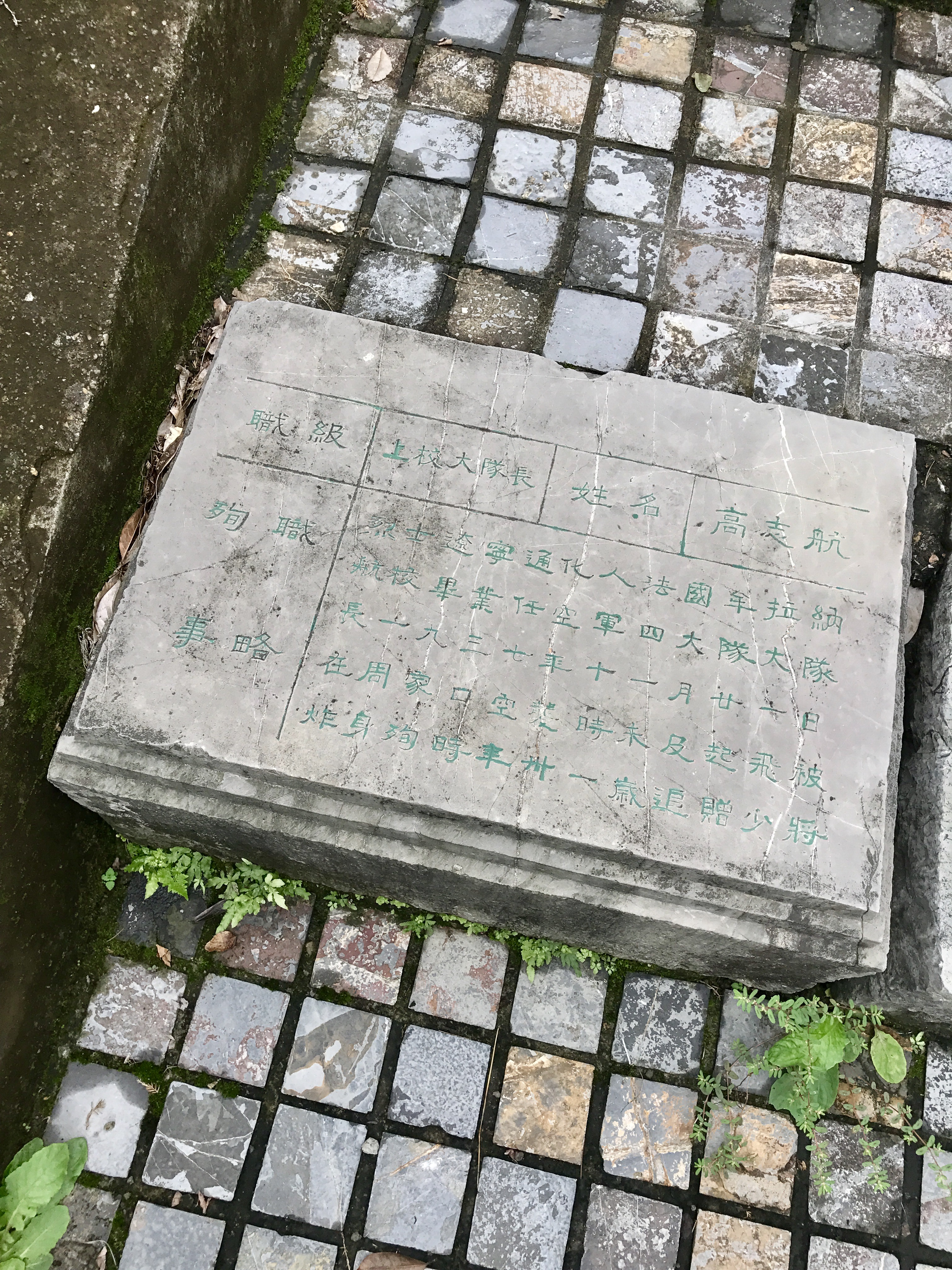 高志航墓碑。位于南京航空烈士公墓（江苏省文保单位）内。